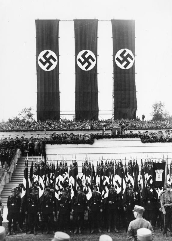 Nürnberg, Reichsparteitag, Rede Adolf Hitler Reichsparteitag 1933 [Nürnberg.- Reichsparteitag der NSDAP, "Reichsparteitag des Sieges", Adolf Hitler auf Rednertribüne unter drei Hakenkreuz-Fahnen, 30. August - 3. September 1933] Abgebildete Personen: Hitler, Adolf: Reichskanzler, Deutschland